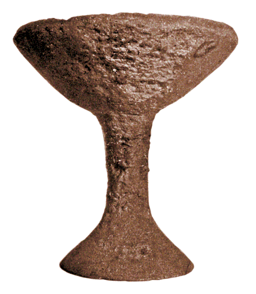 Copa argárica de Caniles (provincia de Granada). El Argar, Bronce Pleno en el sur de España